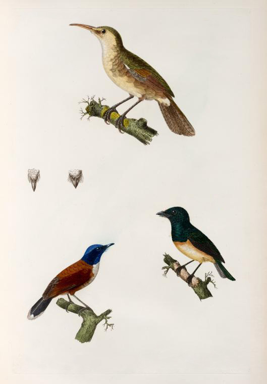 Guam Nightingale Reed-warbler (Acrocephalus luscinius luscinius) above. Voyage de la corvette l'Astrolabe : exécuté par ordre du roi, pendant les années 1826-1827-1828-1829. Zoologie. Tome 1, pt.1. 1830